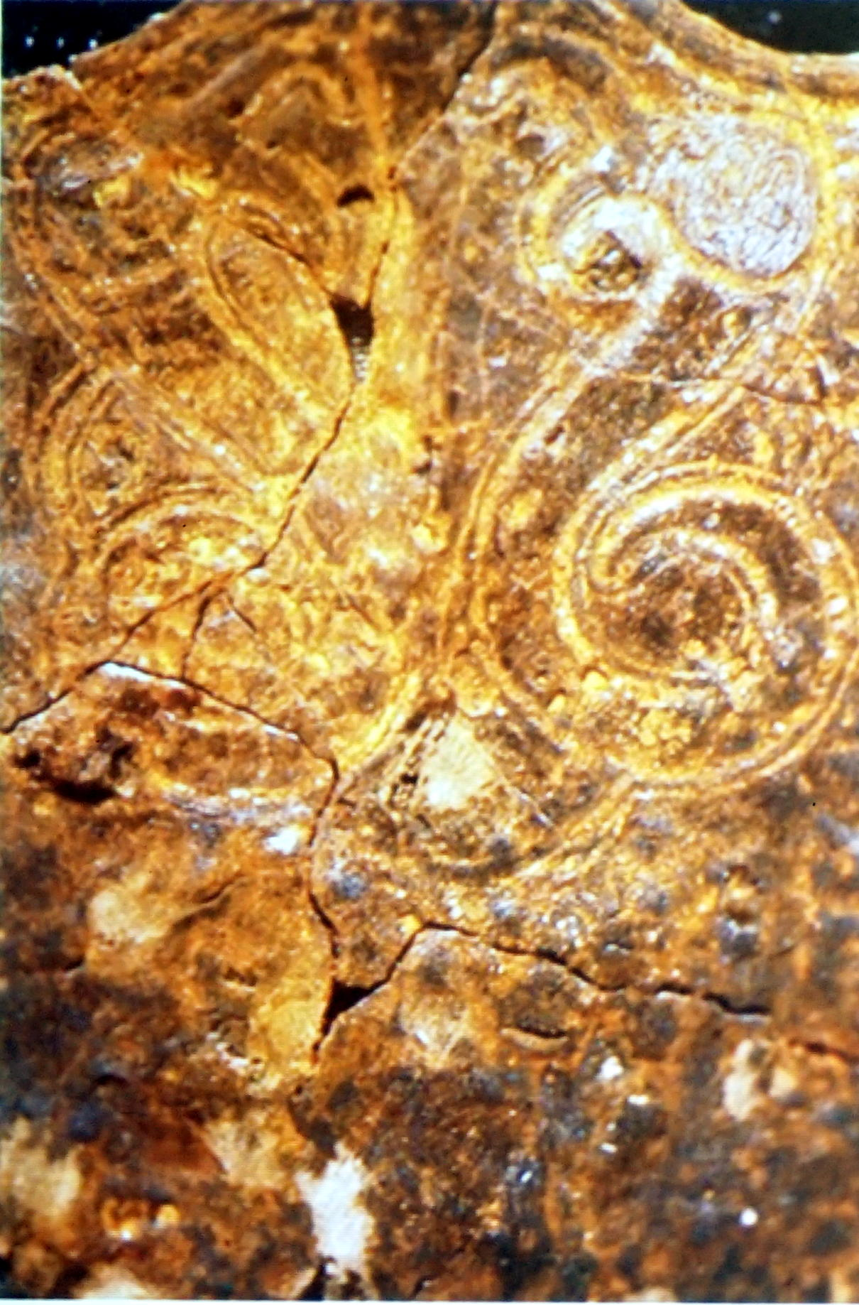 détail dragon sur un fourreau trouvé lors de fouilles de Bucy.